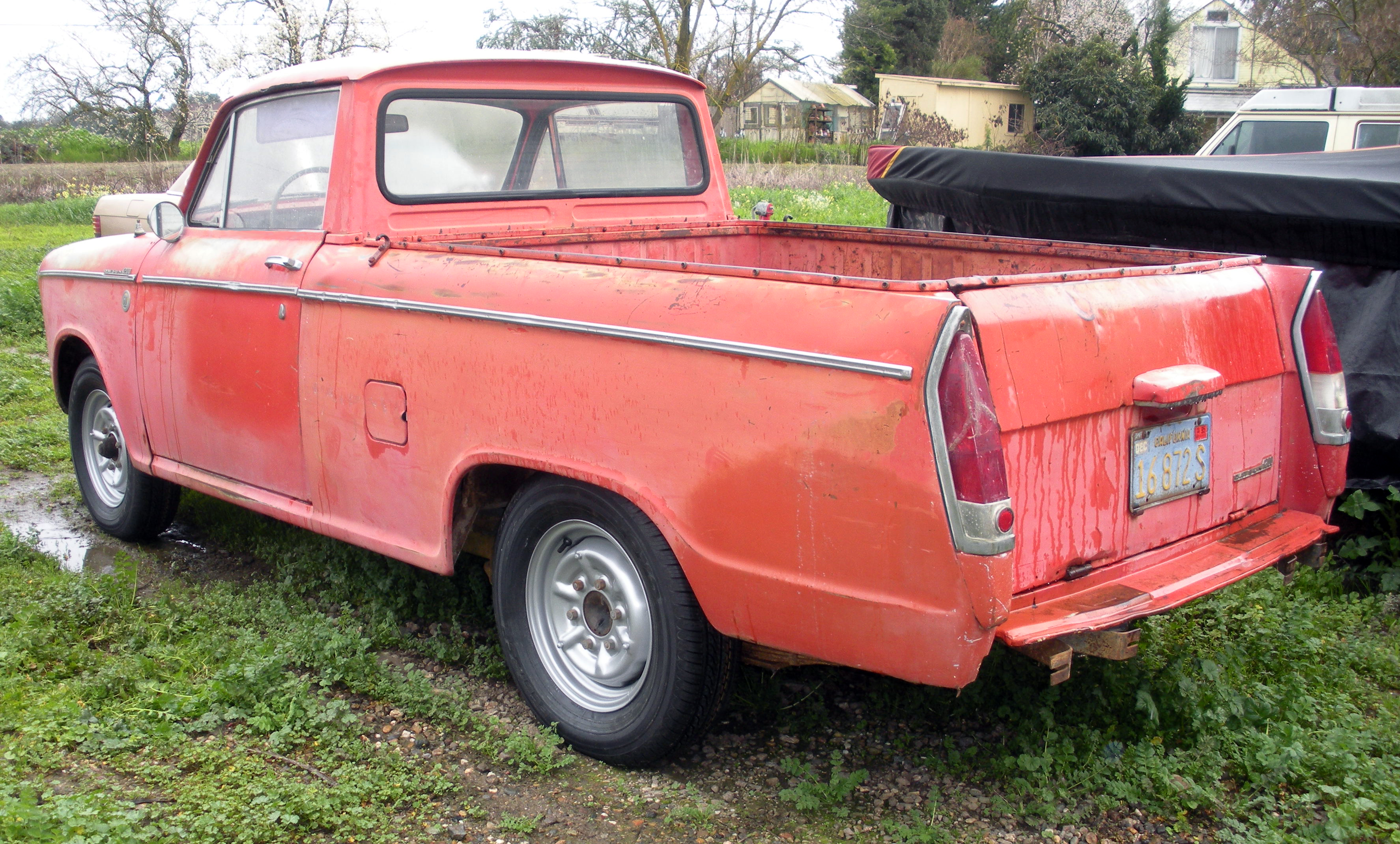 1964 Datsun 1200 Pickup (NL320), US market